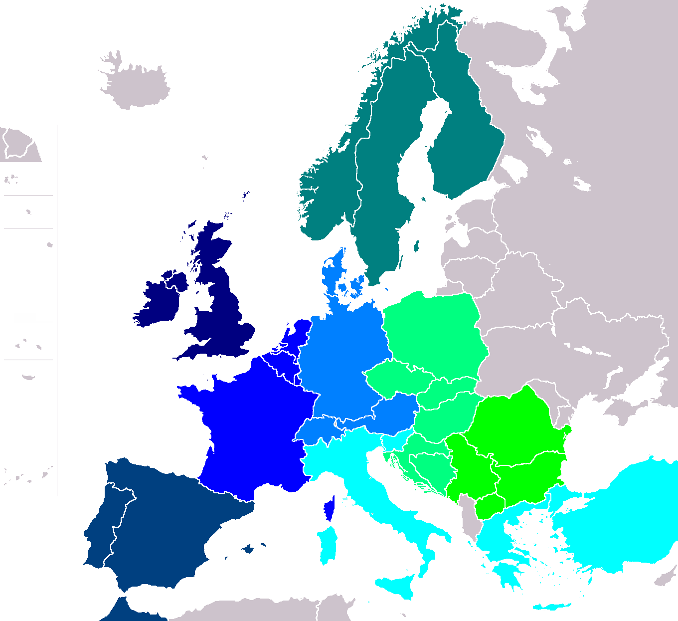 Immagine da me elaborata a partire da una cartina muta in PD presente sulla wikipedia inglese.